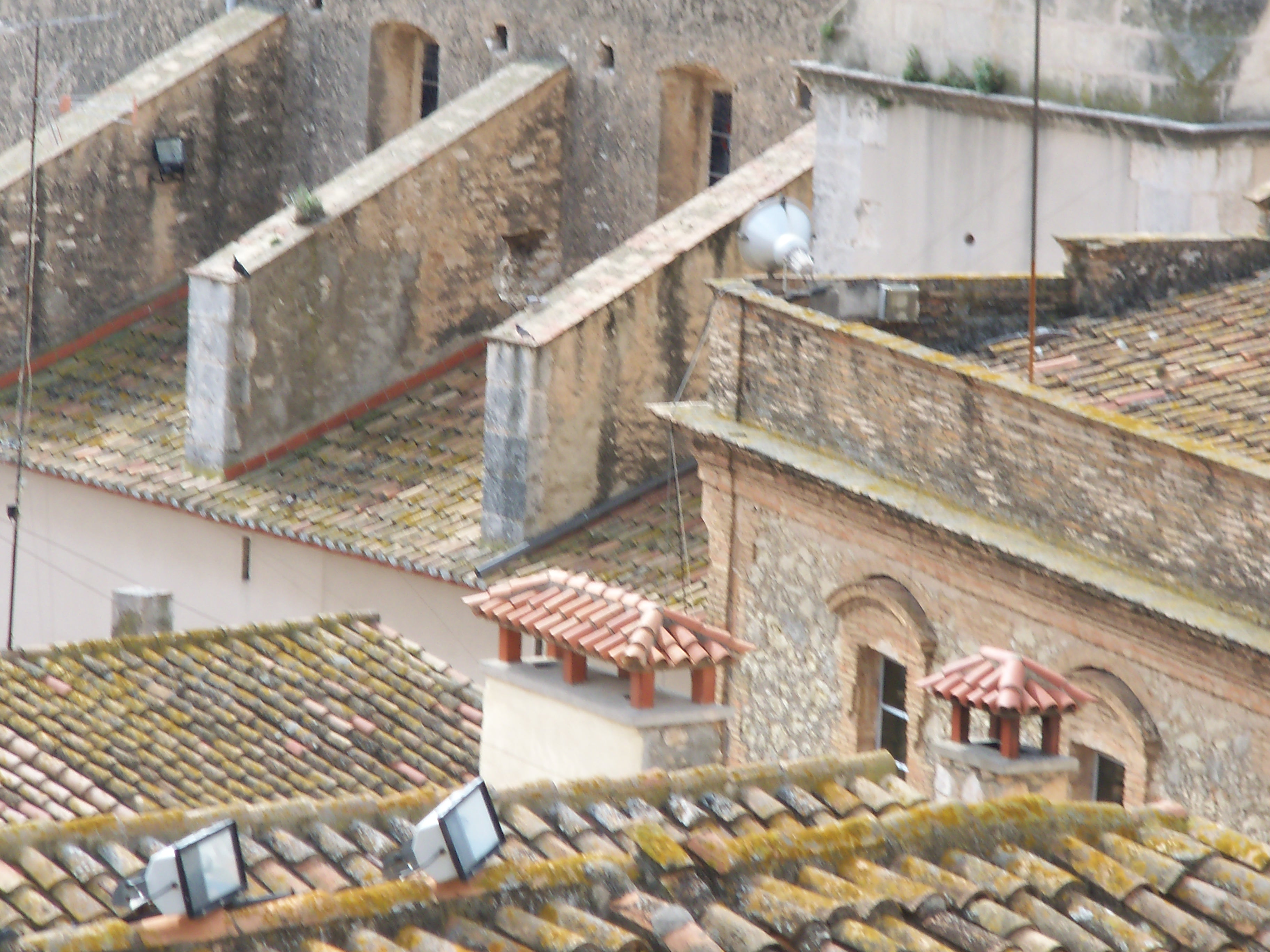 Església parroquial de la Santa Creu (Calafell)